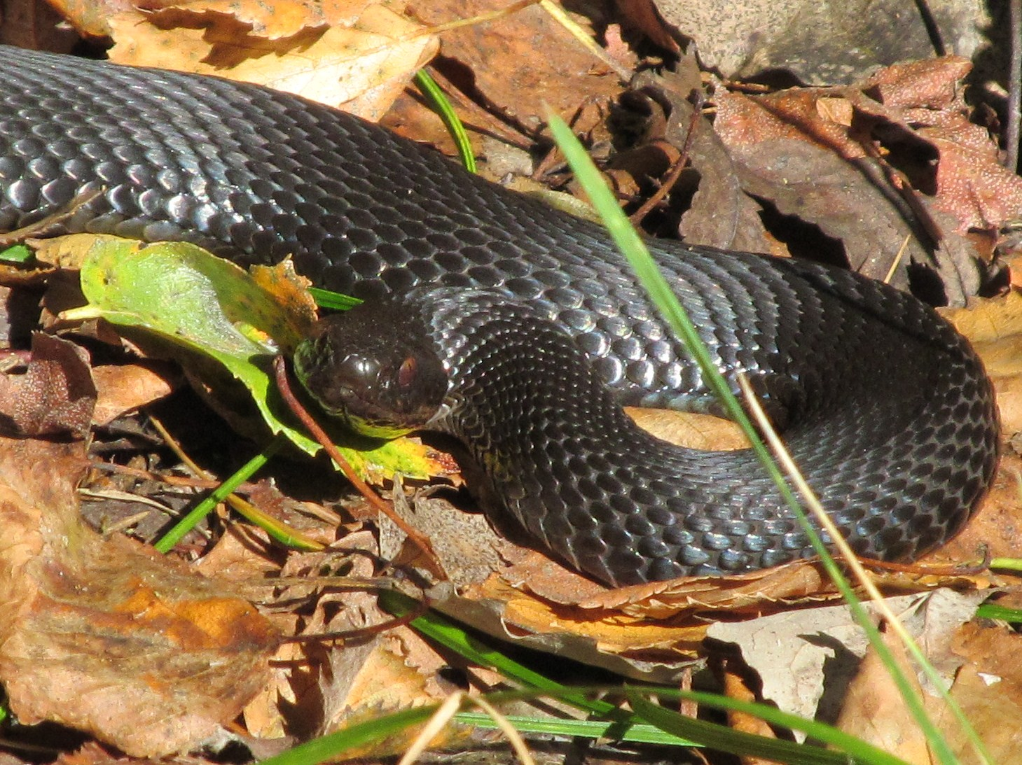 Гадюка Никольского в лесу в Тверской области